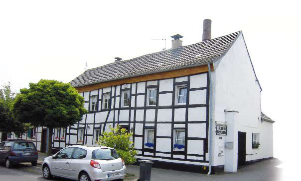 Ehemalige Römerbrauerei